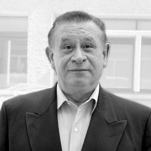 Imagen del Dr. Javier Aguilar Garcia, tomada en el IIS-UNAM